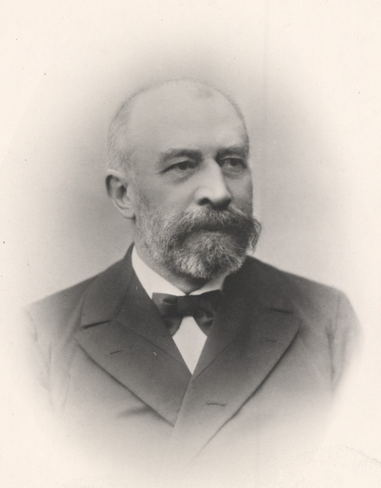 Hugo Egmont Hørring (født 17. august 1842 i København - død 13. februar 1909), dansk konseilspræsident (23. maj 1897 - 27. april 1900).